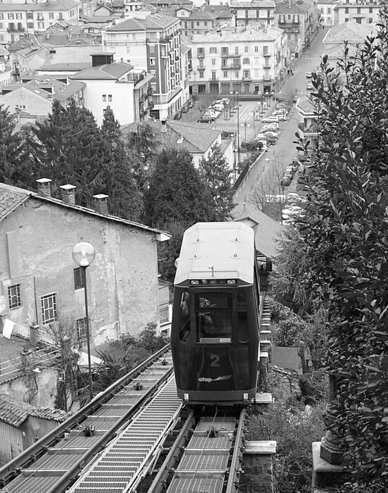 Tandradbaantje van Biella naar Piazzo